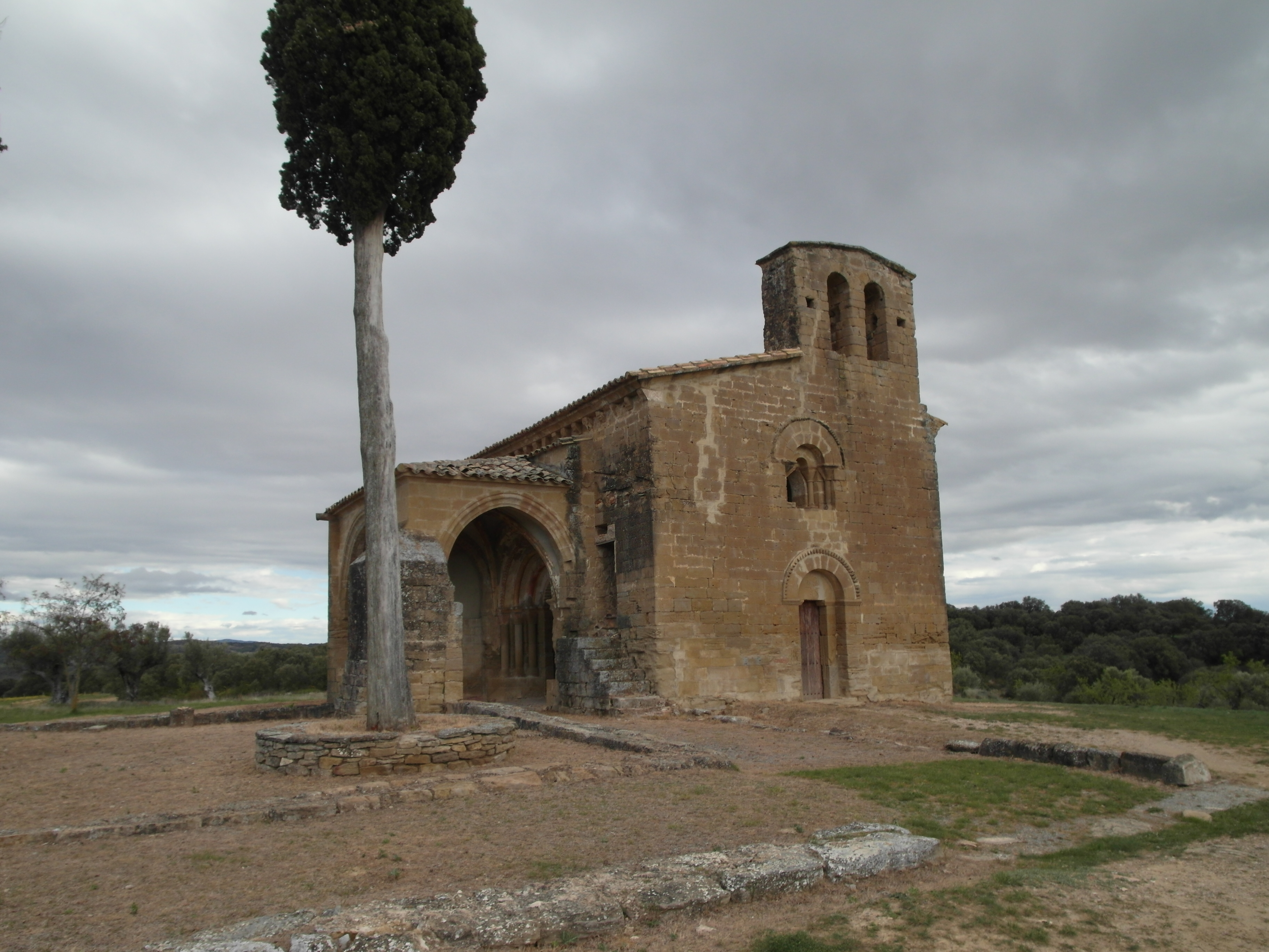 Ermita de Nuestra Señora de Treviño, Adahuesca, Huesca.